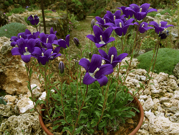 Campanule (Campanula bessenginica) du centre du Caucase d'une quinzaine de centimètres, que l'on rencontre sur éboulis et rochers acide vers 2500 m. (Photo en culture)